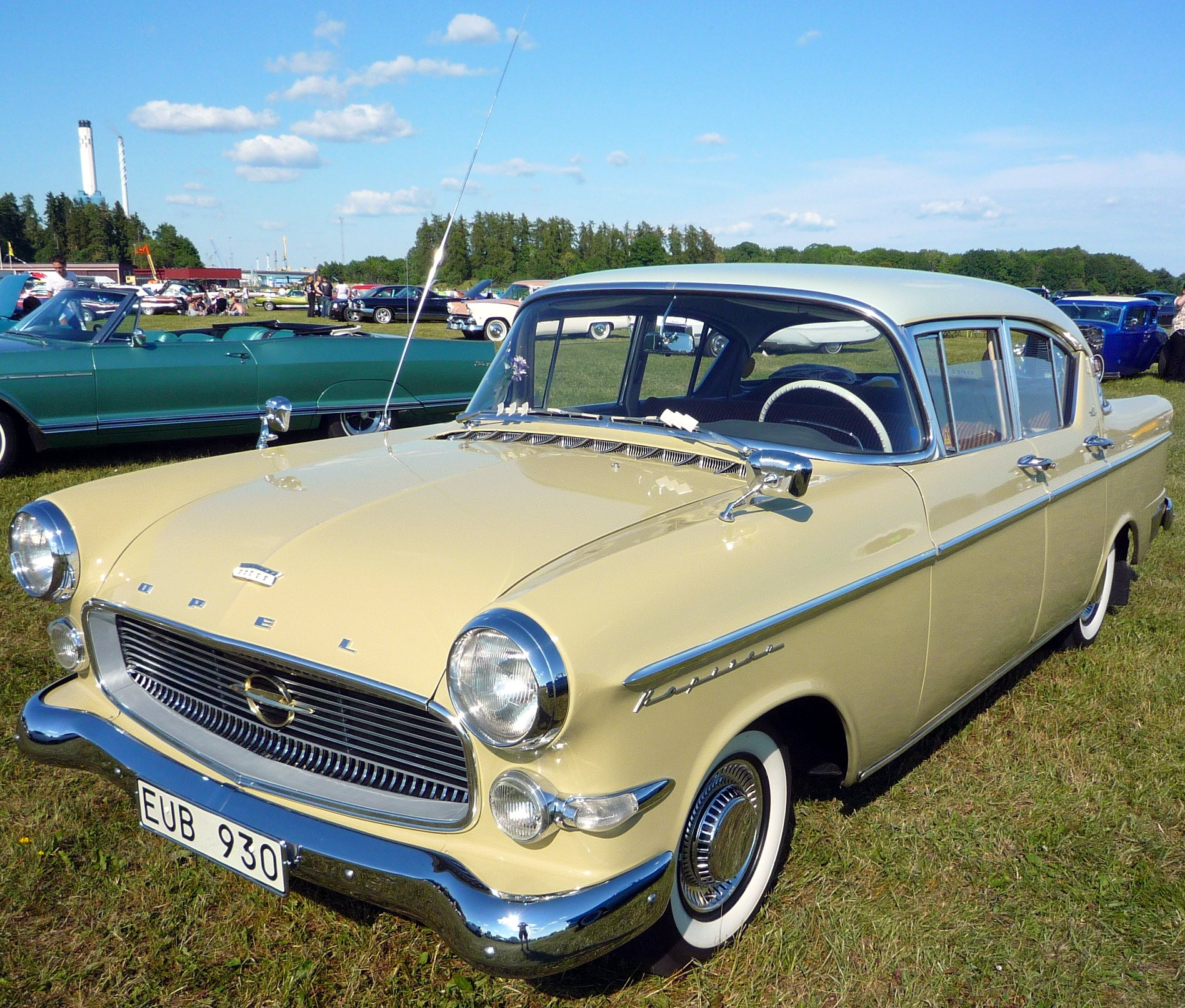 Yellow Opel Kapitän P1